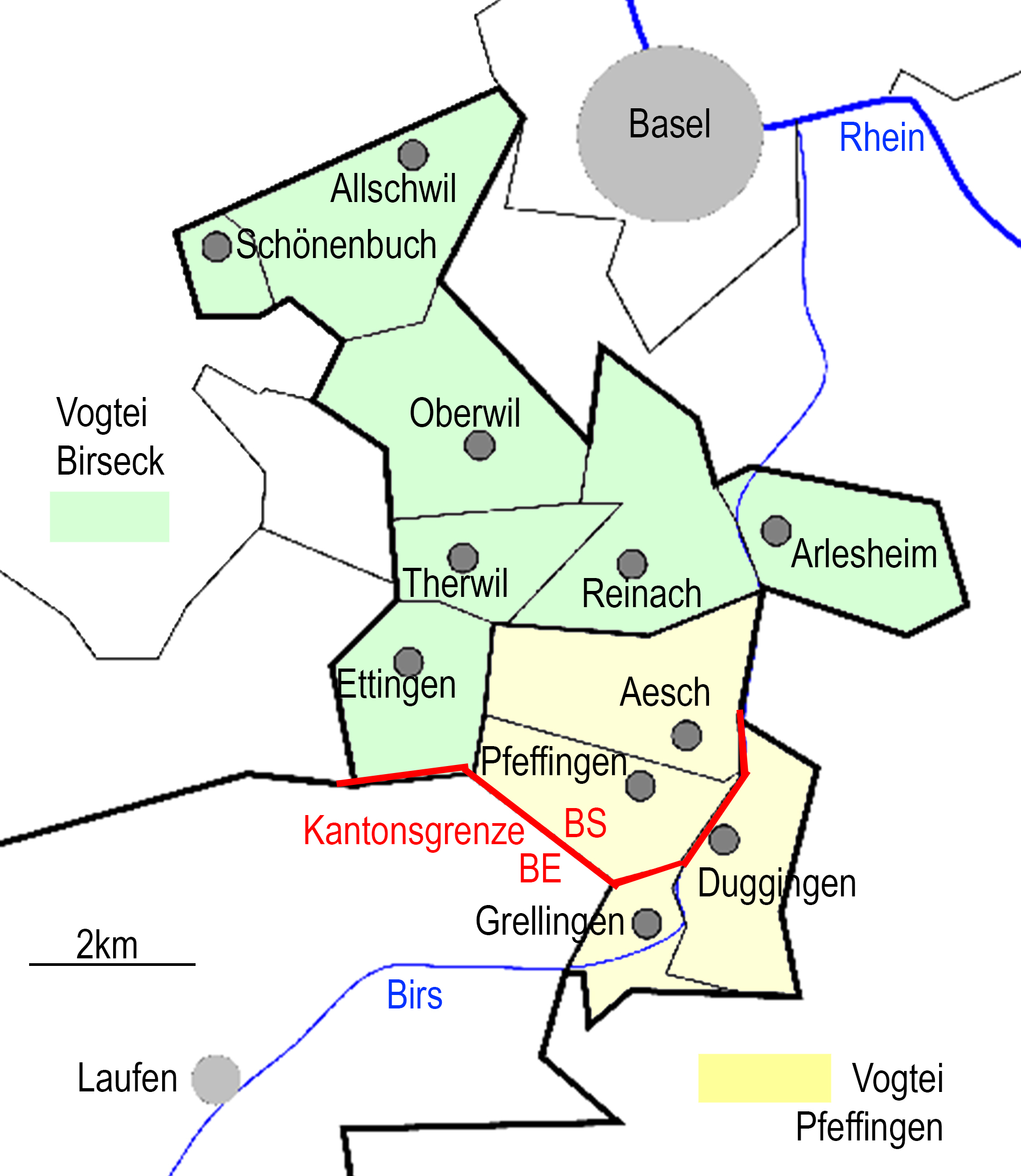 Karte des historischen Birseck